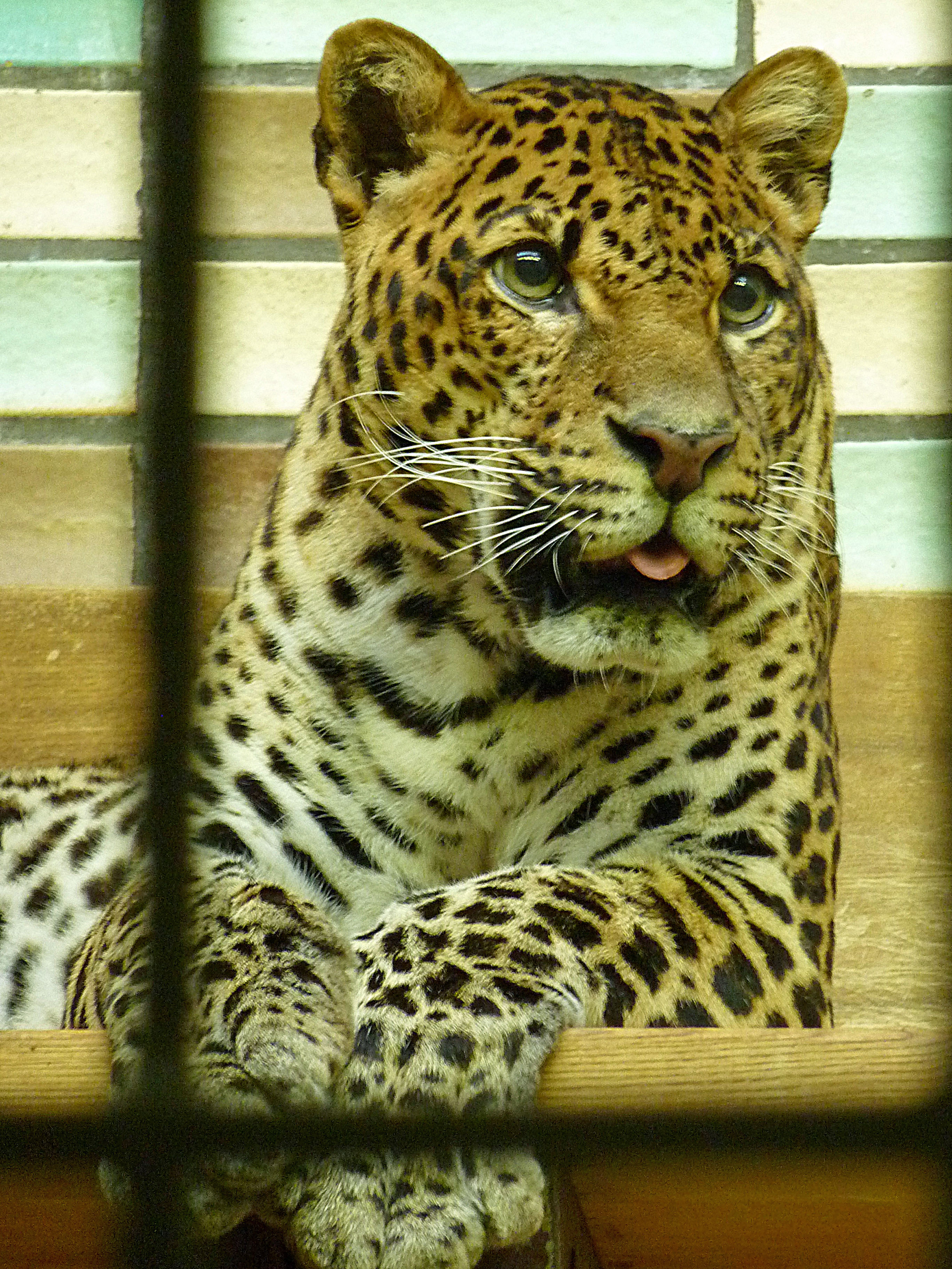 Männlicher Java-Leopard (Panthera pardus melas) namens "Wuppi" im Alfred-Brehm-Haus des Tierparks Berlin-Friedrichsfelde. Geboren im Jahr 1994 in Wuppertal. Hat im Berliner Tierpark mit dem Weibchen "Shinta" zwei am 16. Januar 2012 geborene Jungtiere gezeugt: ein männliches ("Arjuna") und ein weibliches ("Sri Kandi"). Neben einem weiteren Männchen im Berliner Zoologischen Garten handelt es sich um die derzeit einzigen Exemplare dieser bedrohten Art außerhalb von Indonesien.